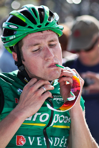 4e étape (Col du Grand Colombier) du Tour de l'Ain 2011